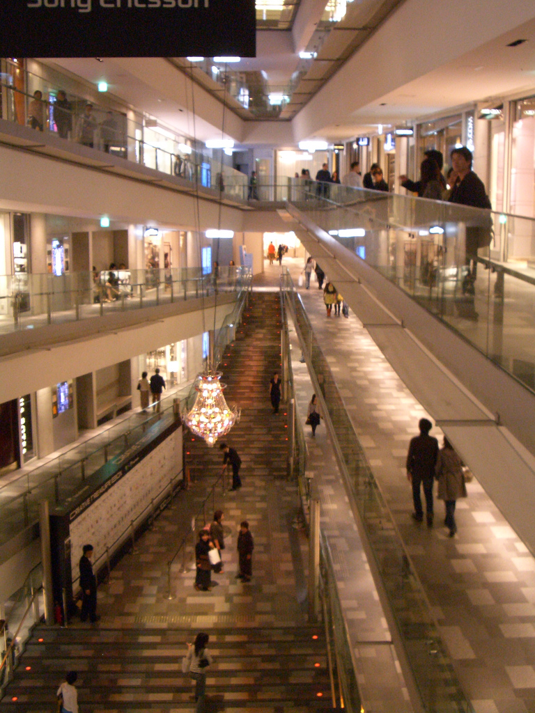 @代官山ヒルズ